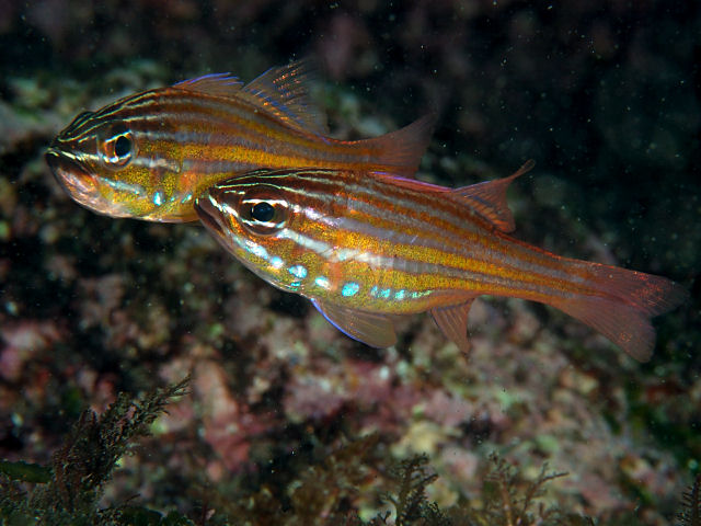 スジオテンジクダイ Apogon holotaenia